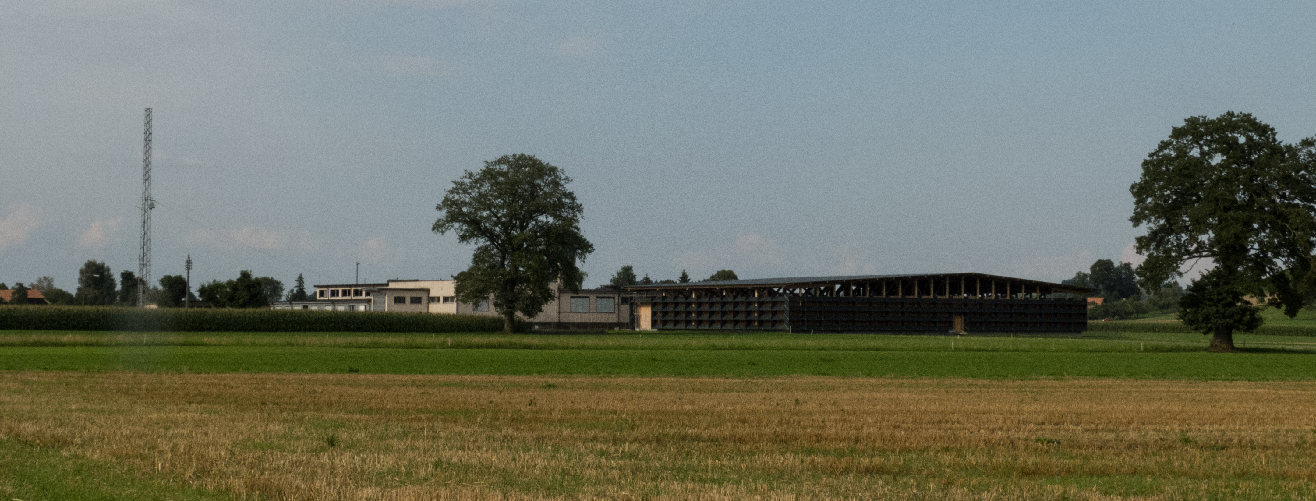 Gesamtanlage